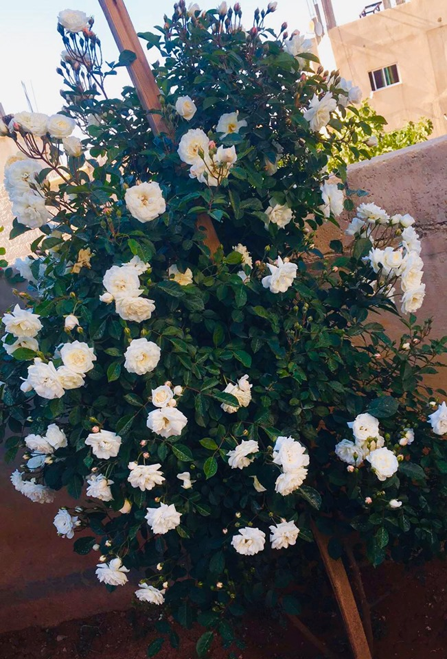 صورة لطريقة زراعة وتعليق أزهارالجوري البيضاء في منطقة ماركا الشمالية في العاصمة عمان